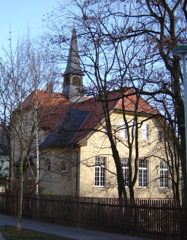 Magdeburg-Brückfeld, Hubbestift